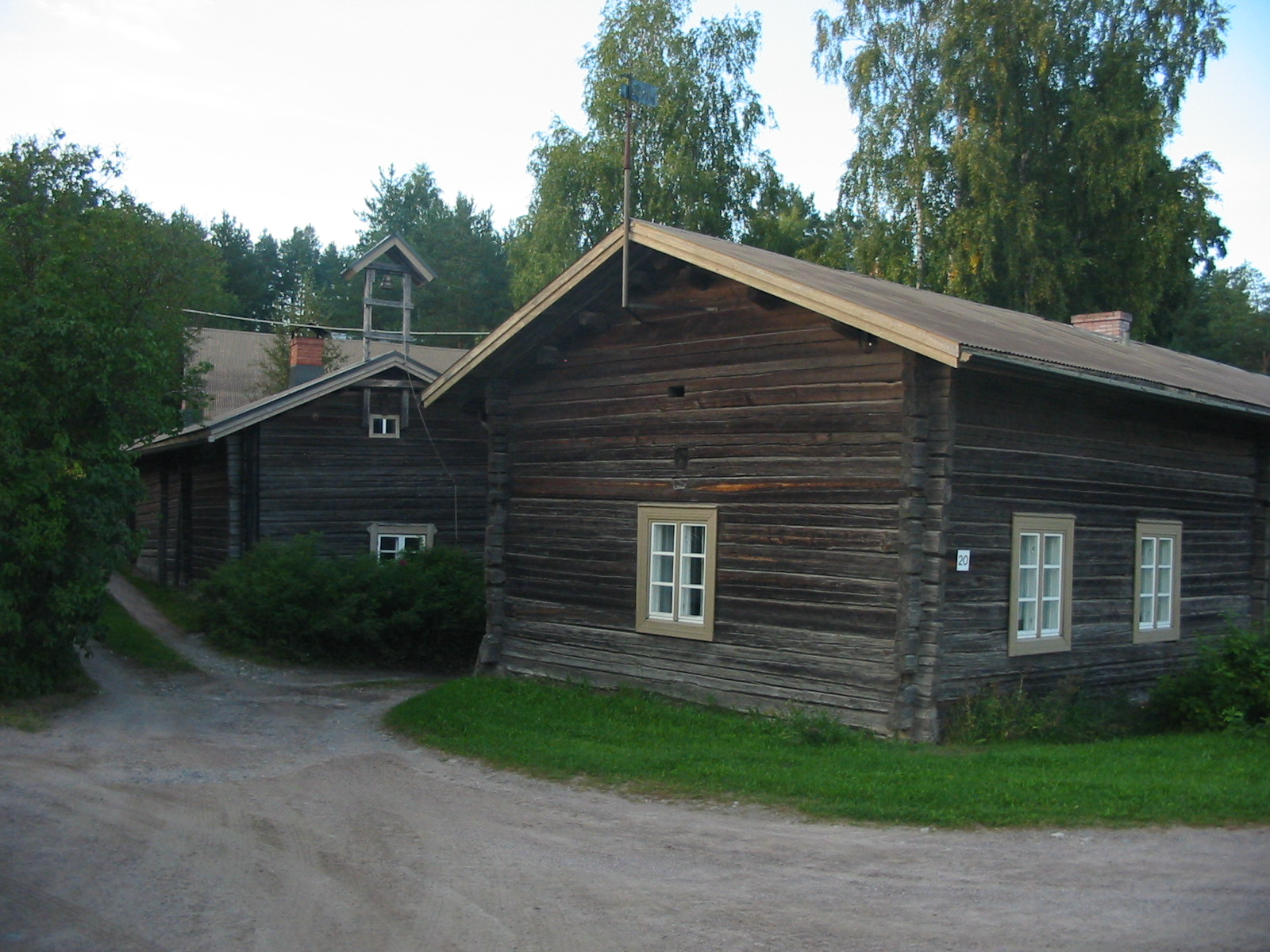 Portaan Syrjälän umpipiha Tammelassa